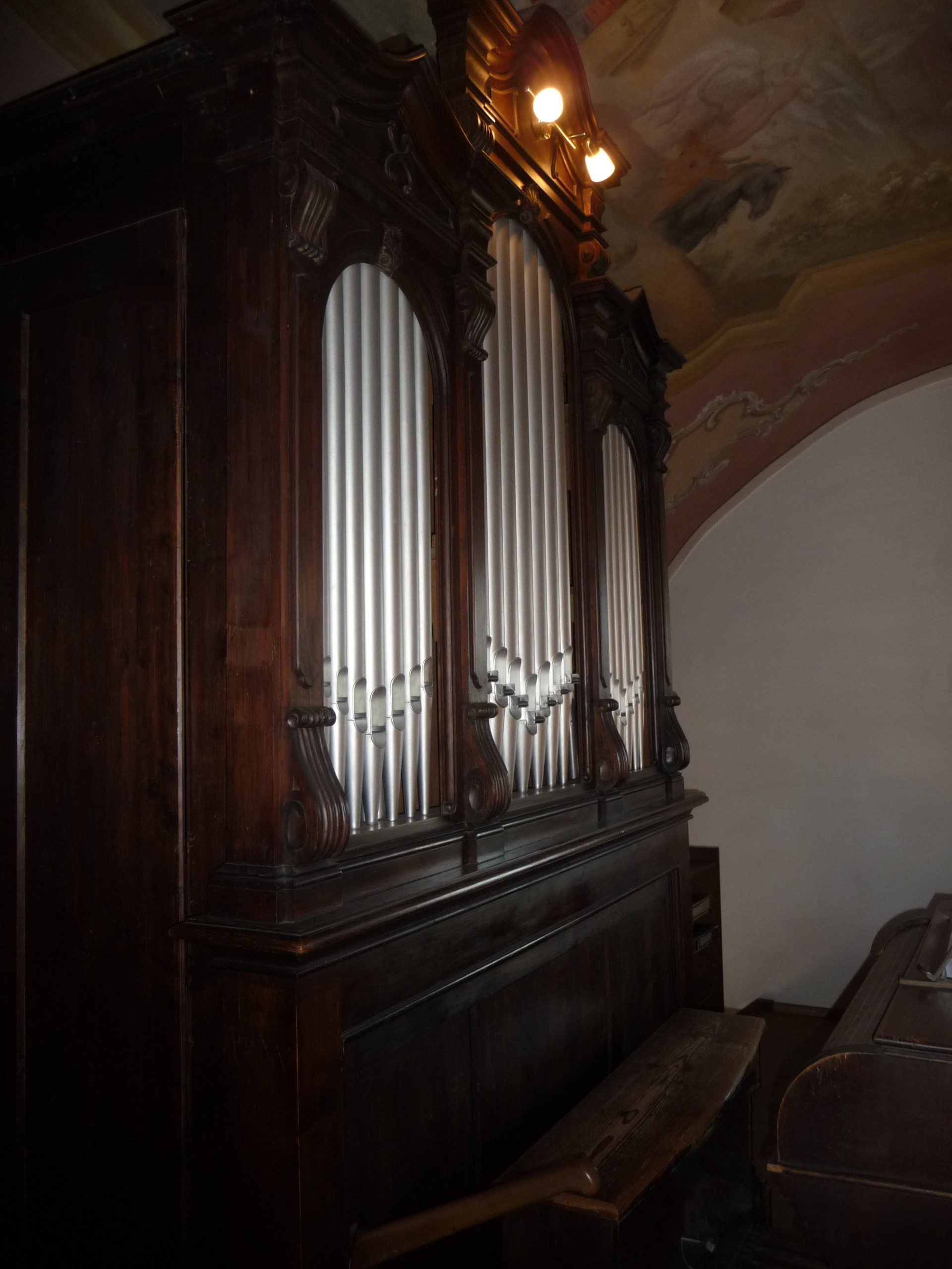 Orgel der Kirche St. Koloman in Regenburg-Harting. Ein Beispiel der kleinsten Orgeln, die von Binder & Siemann erbaut wurden mit 1 Manual und 4 Register. Im Original erhalten